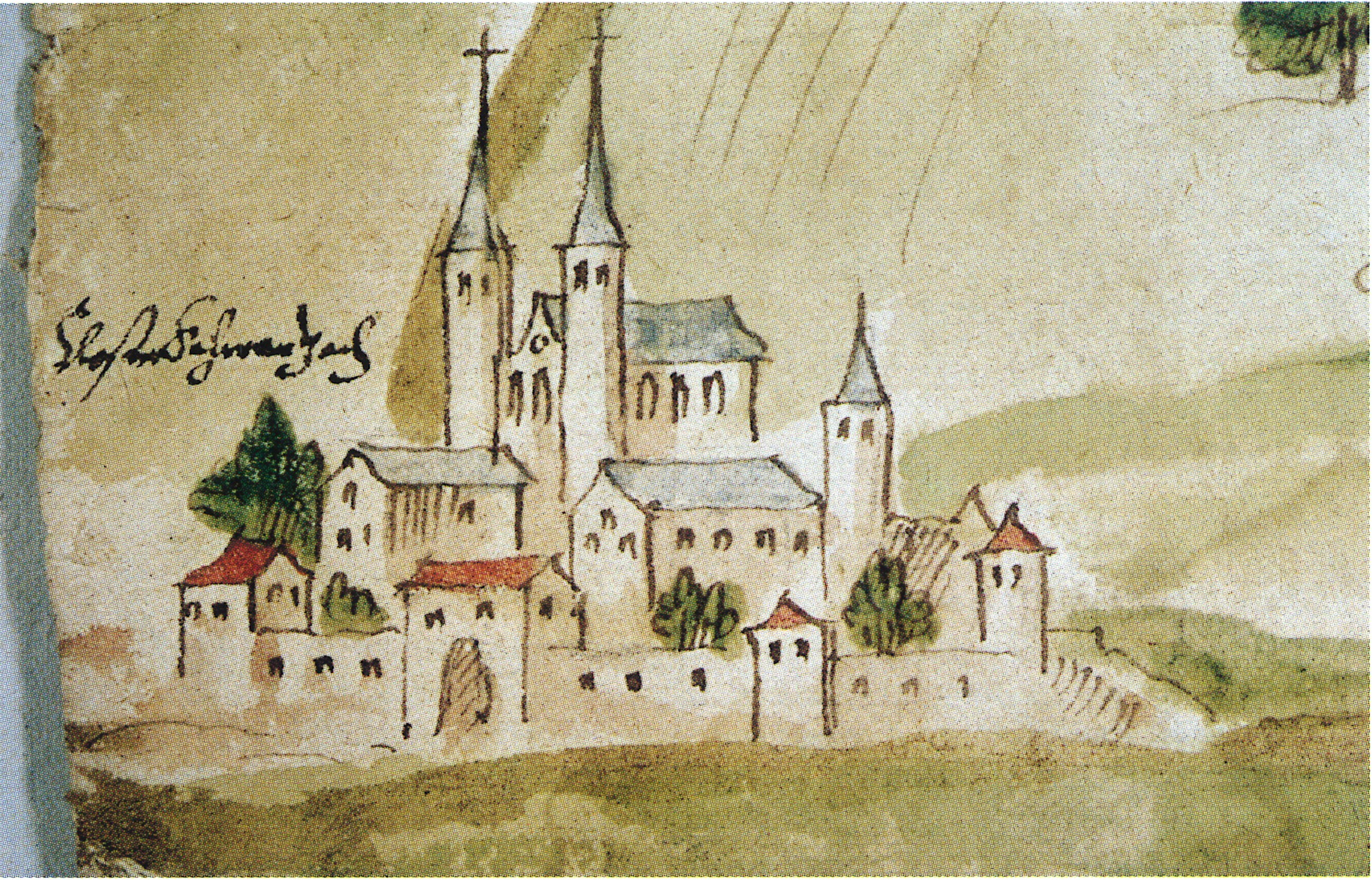 Abtei Münsterschwarzach im Jahr 1616, Detail